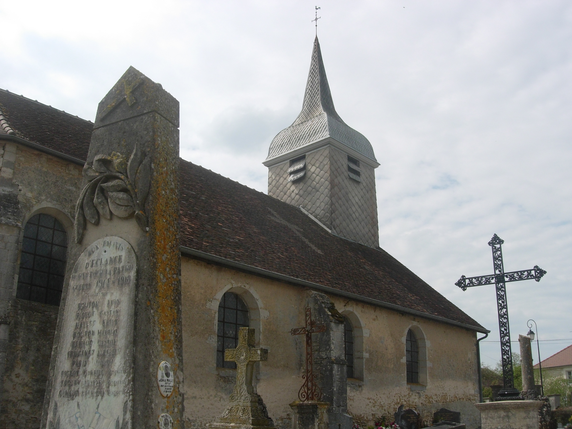 Eclance (Aube)